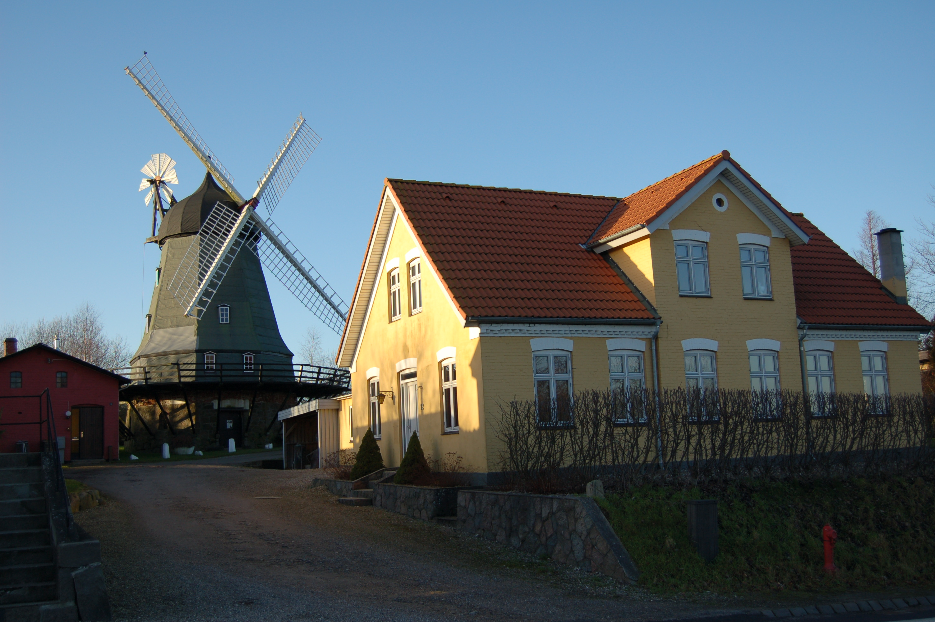 Old Mill in Aarup, Funen, Denmark